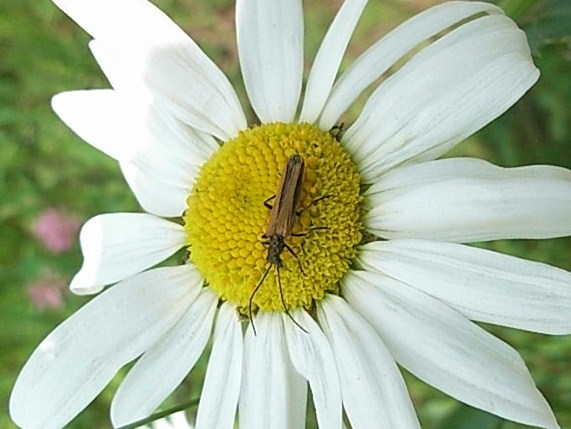 Gemeiner Scheinbockkäfer (Oedemera femorata), Weibchen, auf einer Margerite bei Jungmaierhütte, Bayerischer Wald